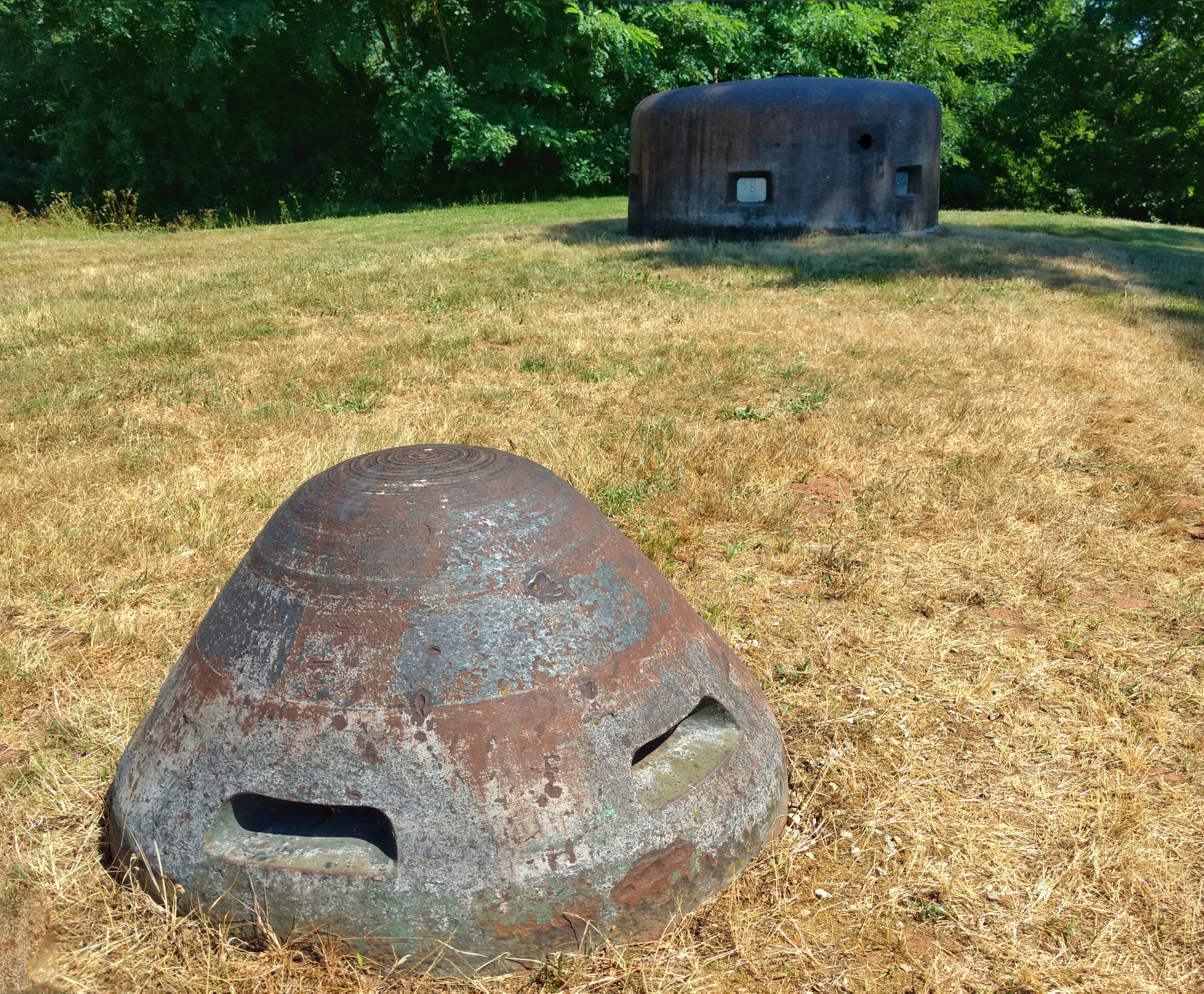 Beobachtunsglocke für den Feuerleitstand